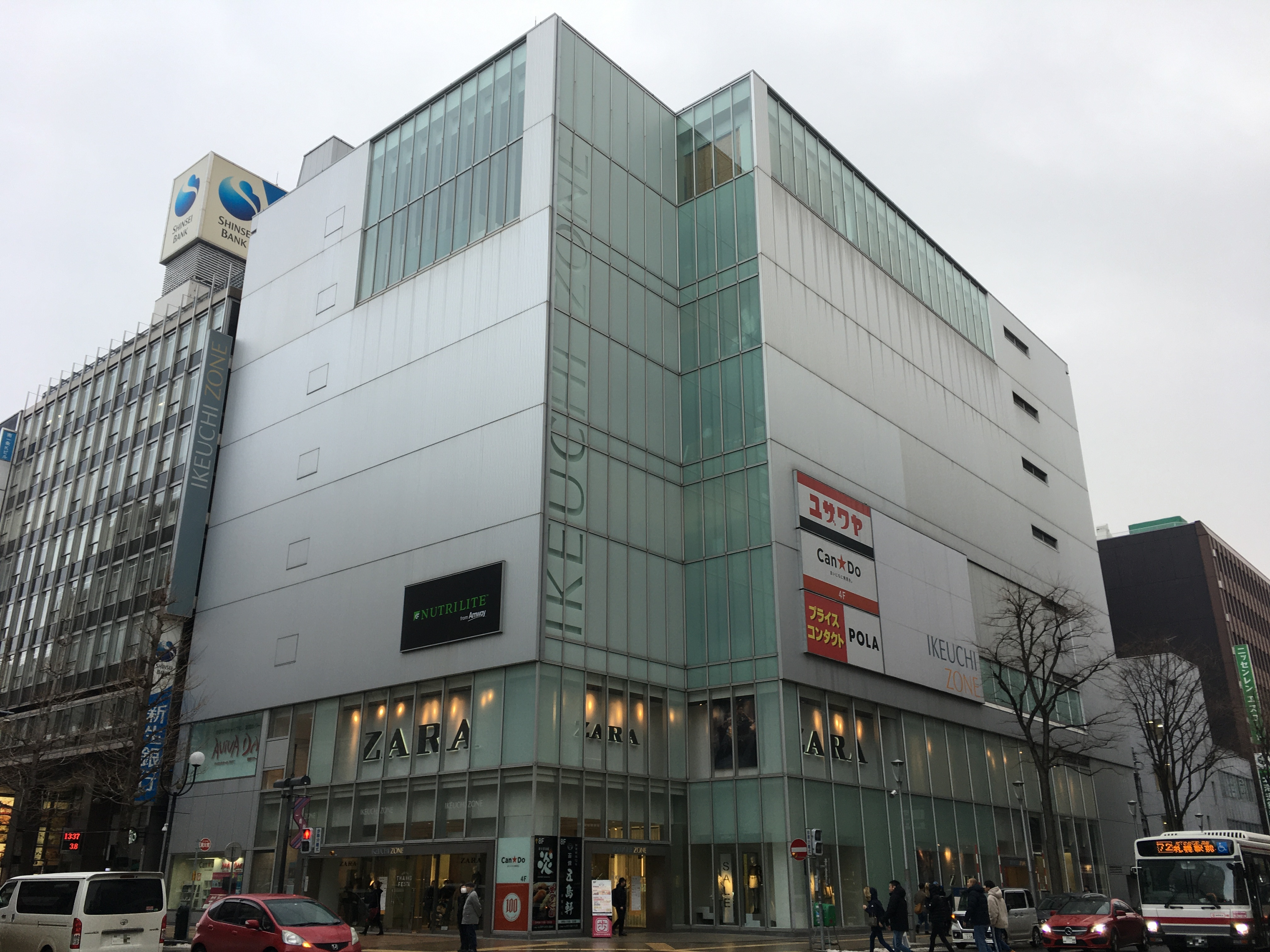 IKEUCHI ZONE（札幌市中央区）